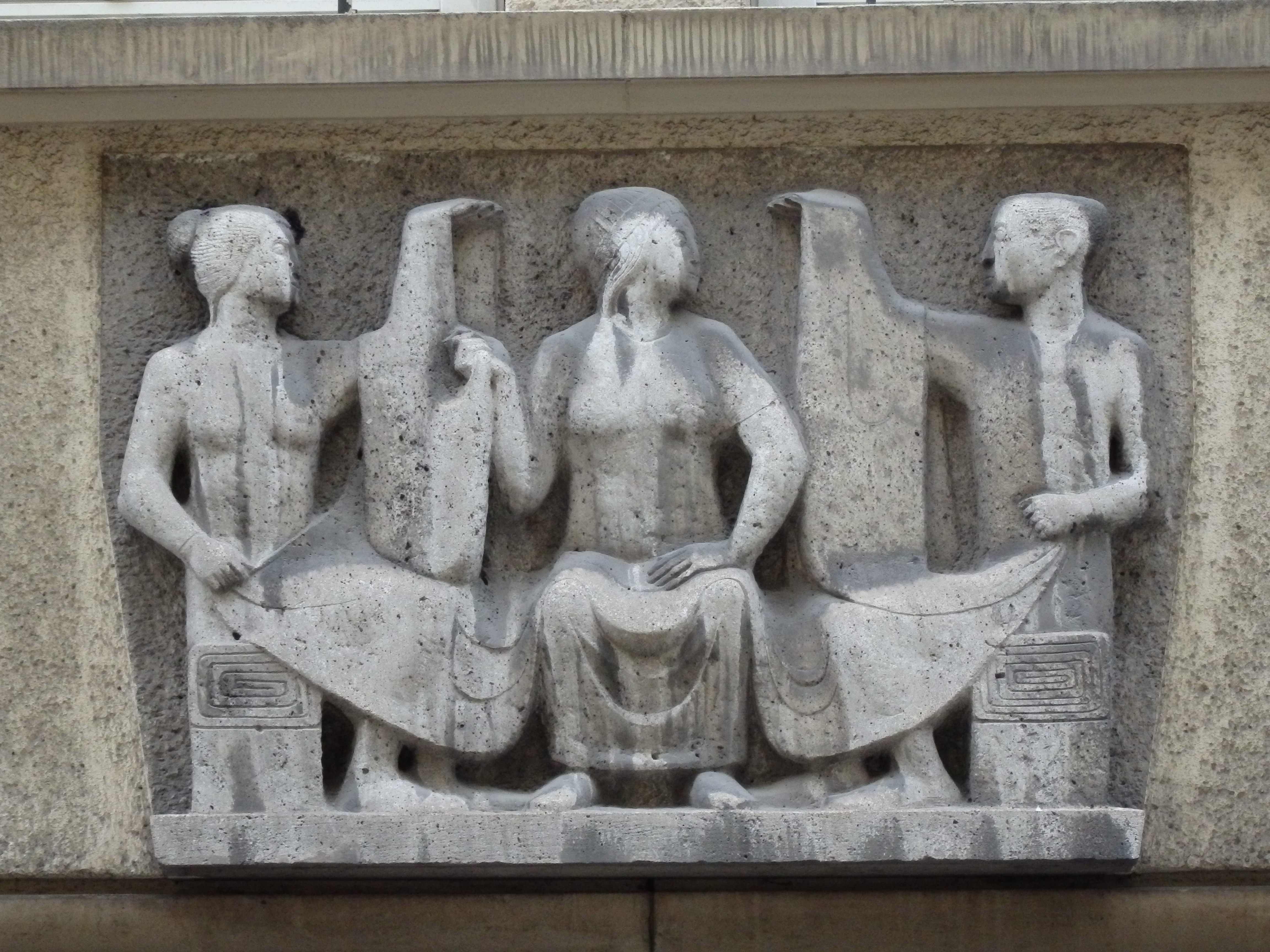 Stoffhandel (1953) von Oskar Bottoli, Fischerstiege 4-8, Wien-Innere Stadt